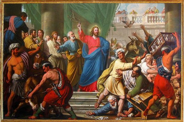 Cacciata dei profanatori dal Tempio - Lattanzio Querena - Clusone, Chiesa di San Luigi